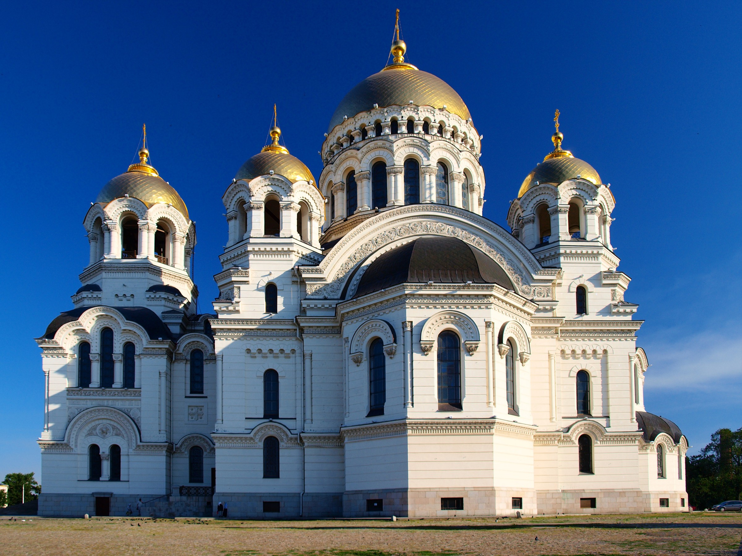 Войсковой Вознесенский собор — усыпальница Героев Отечественной войны 1812 года: М. И. Платова, В. В. Орлова-Денисова, И. Е. Ефремова (Ростовская область, Новочеркасск, Ермака площадь, 1)